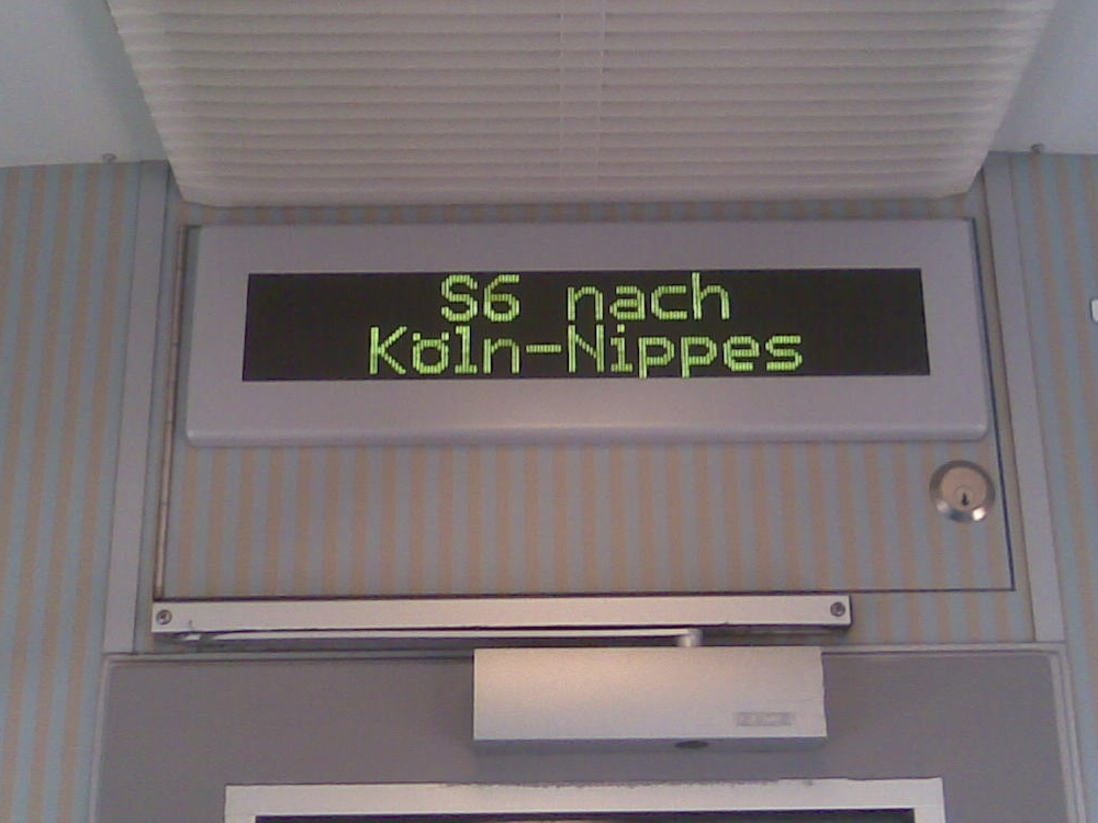 FIS-Anzeiger im S-Bahn-Wagen der Bauart Bx 794.4 mit der Wagennummer 50 80 20-33 292-2.